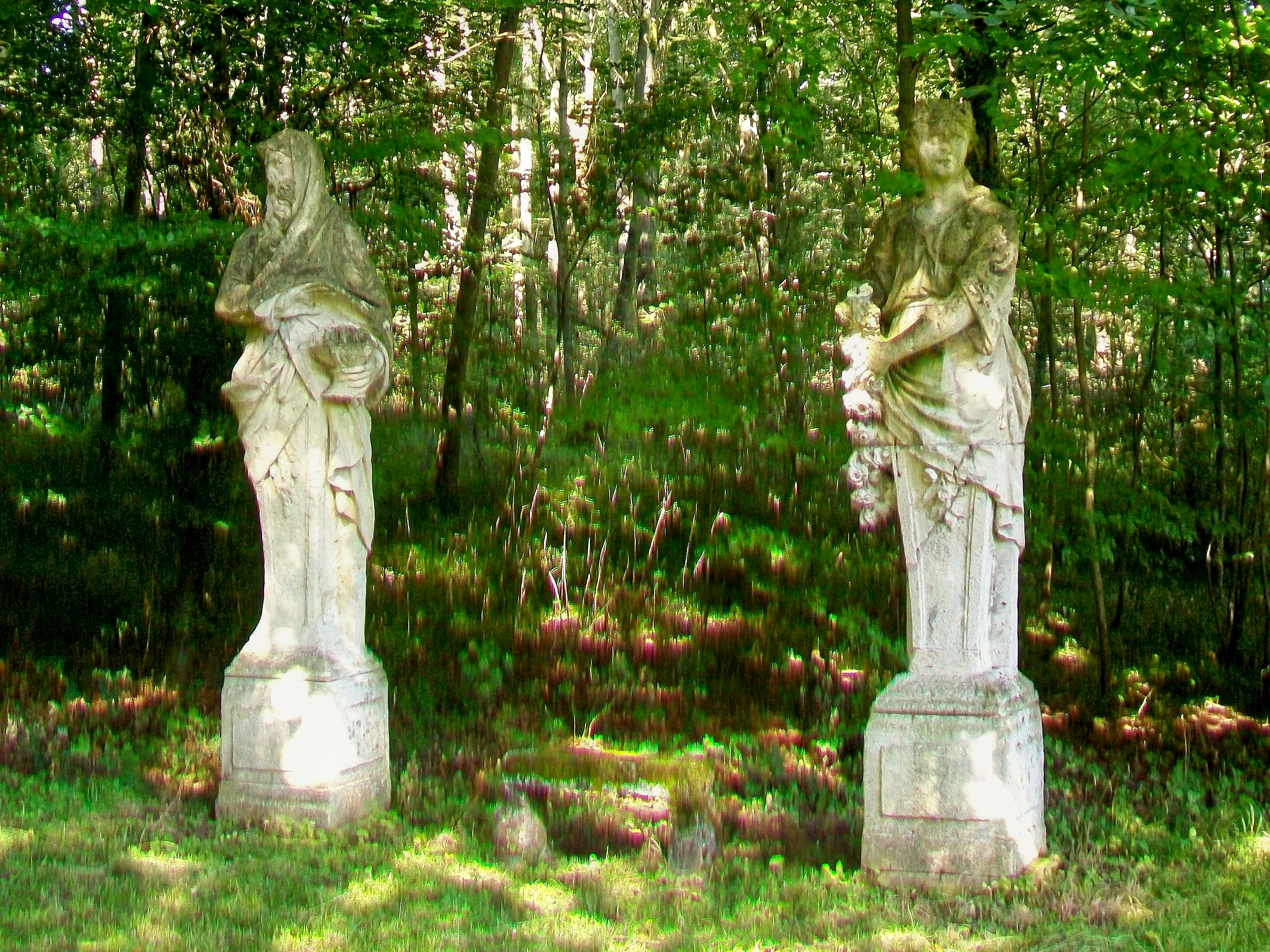 Deux des trois statues « Les quatre Saisons », l'Hiver et le Printemps,au bosquet des Saisons ou salle de verdure, sur la terrasse en haut de l'escalier à l'ouest du miroir d'eau. Cet aménagement a été achevé en 1690. La statue représentant l'automne n'a toutefois jamais été livrée ; l'on n'en voit que le socle d'où sort une tige de fer.